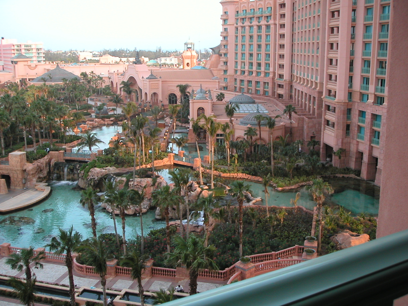 Atlantis, Paradise Island, Nassau, Bahamas.